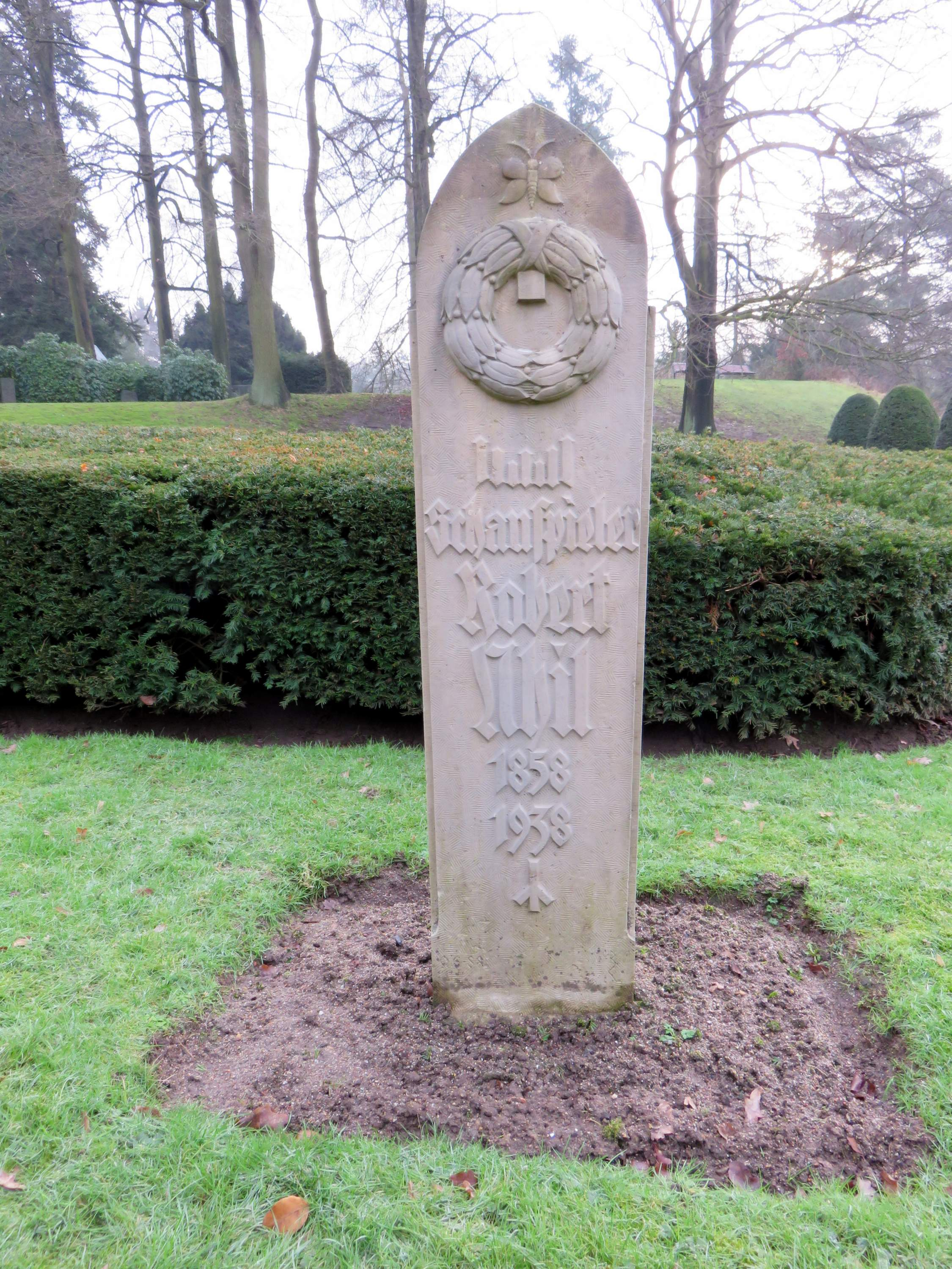 Grabmal zu Ehren des deutschen Schauspielers Robert Nhil im Bereich des Althamburgischen Gedächtnisfriedhofs auf dem Hamburger Friedhof Ohlsdorf, geschaffen 1940 vom deutschen Bildhauer Richard Cardi (1894-1960).